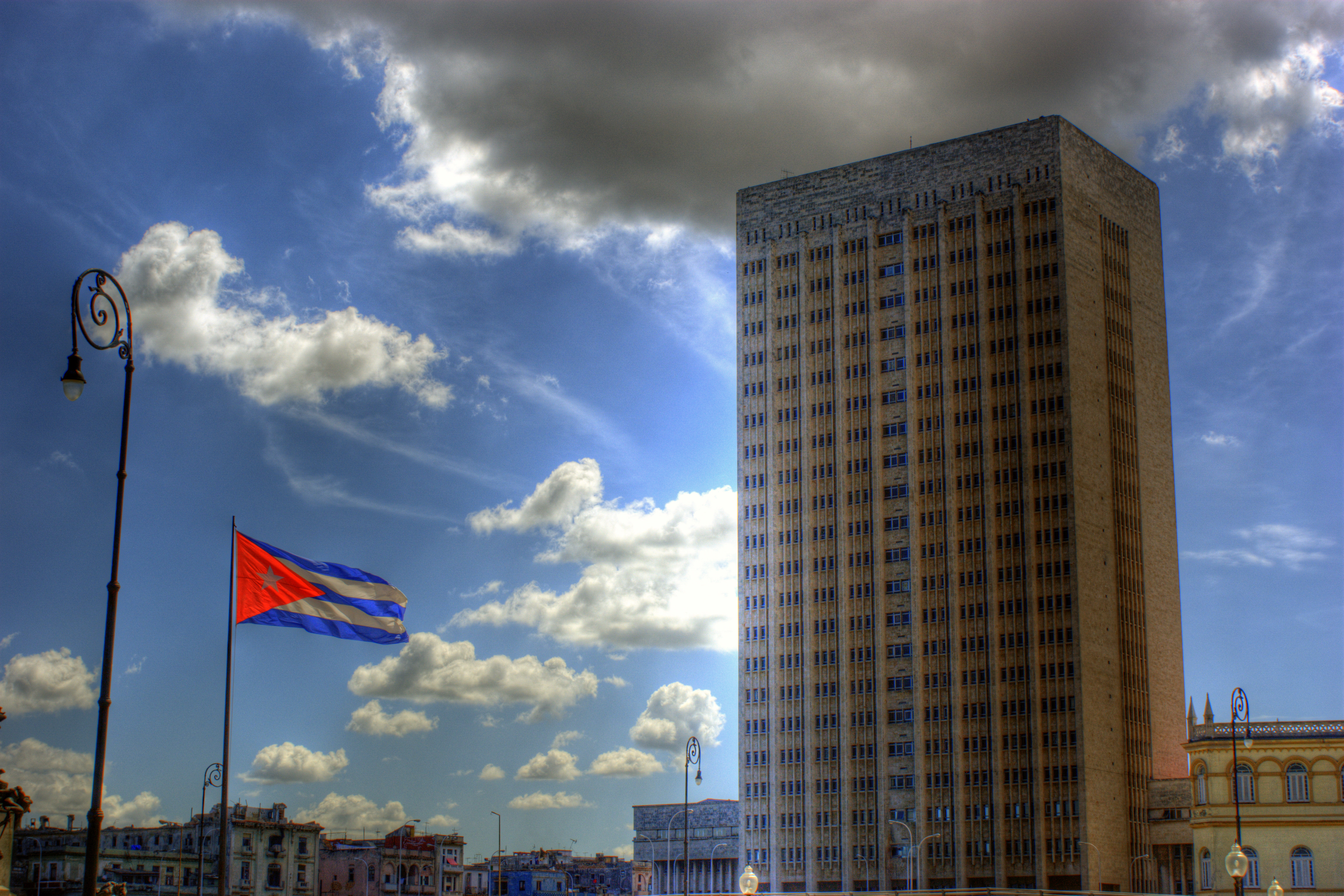 Hospital Hermanos Ameijeiras